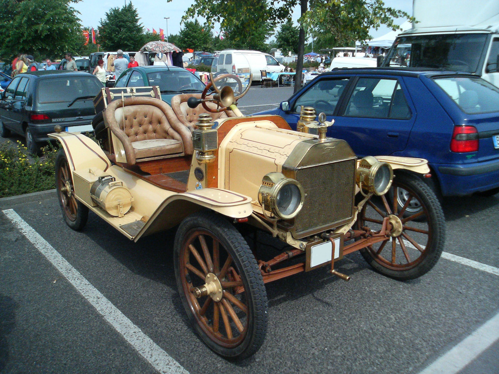 alter Ford